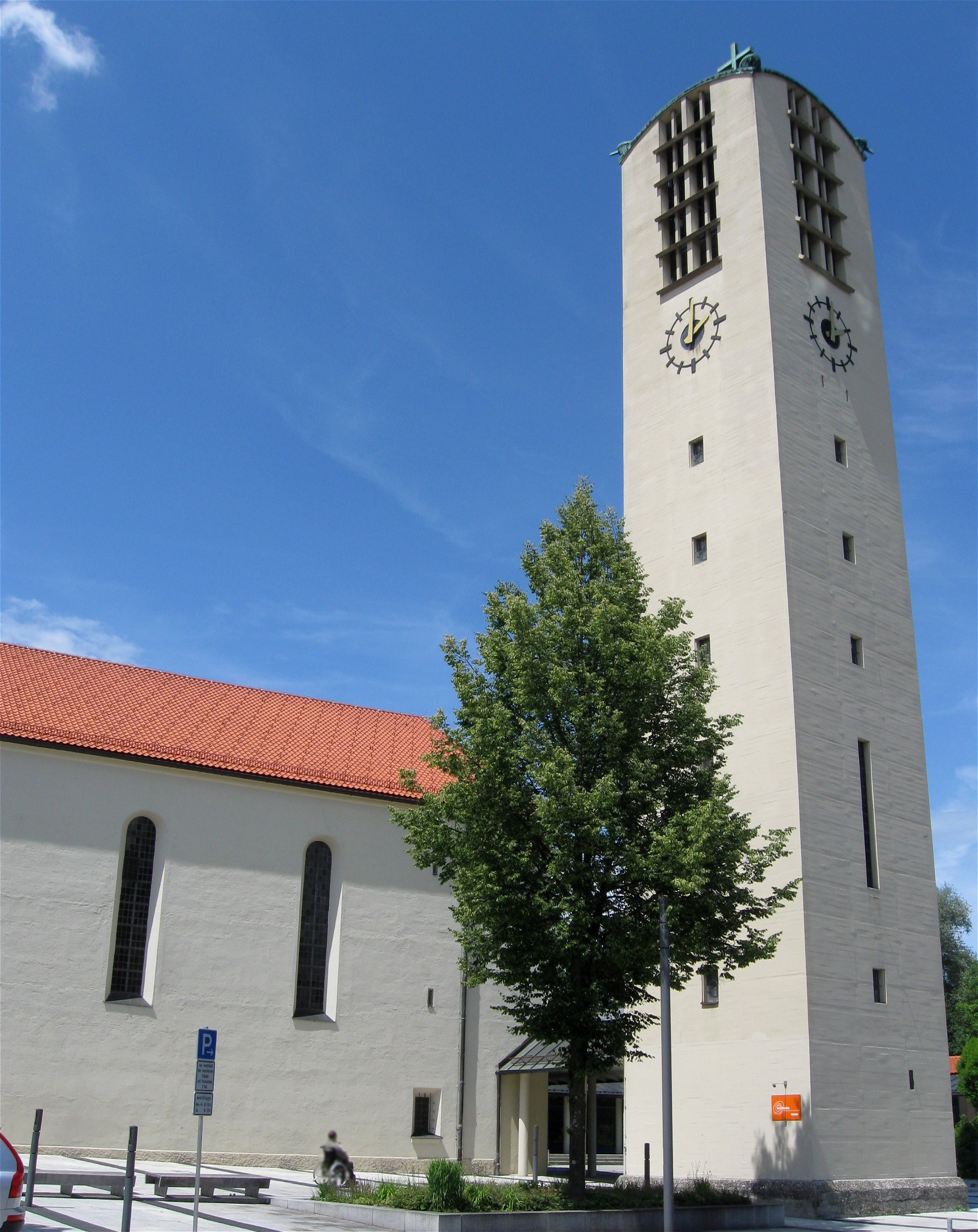 Sigmundstraße 16/20; Kath. Stadtpfarrkirche Christkönig, weiträumige Hallenkirche mit schmalen Seitenschiffen, Rechteckchor in Mittelschiffbreite und campanile-artigem Turm, 1949 ff. von Michael Steinbrecher; mit Ausstattung.